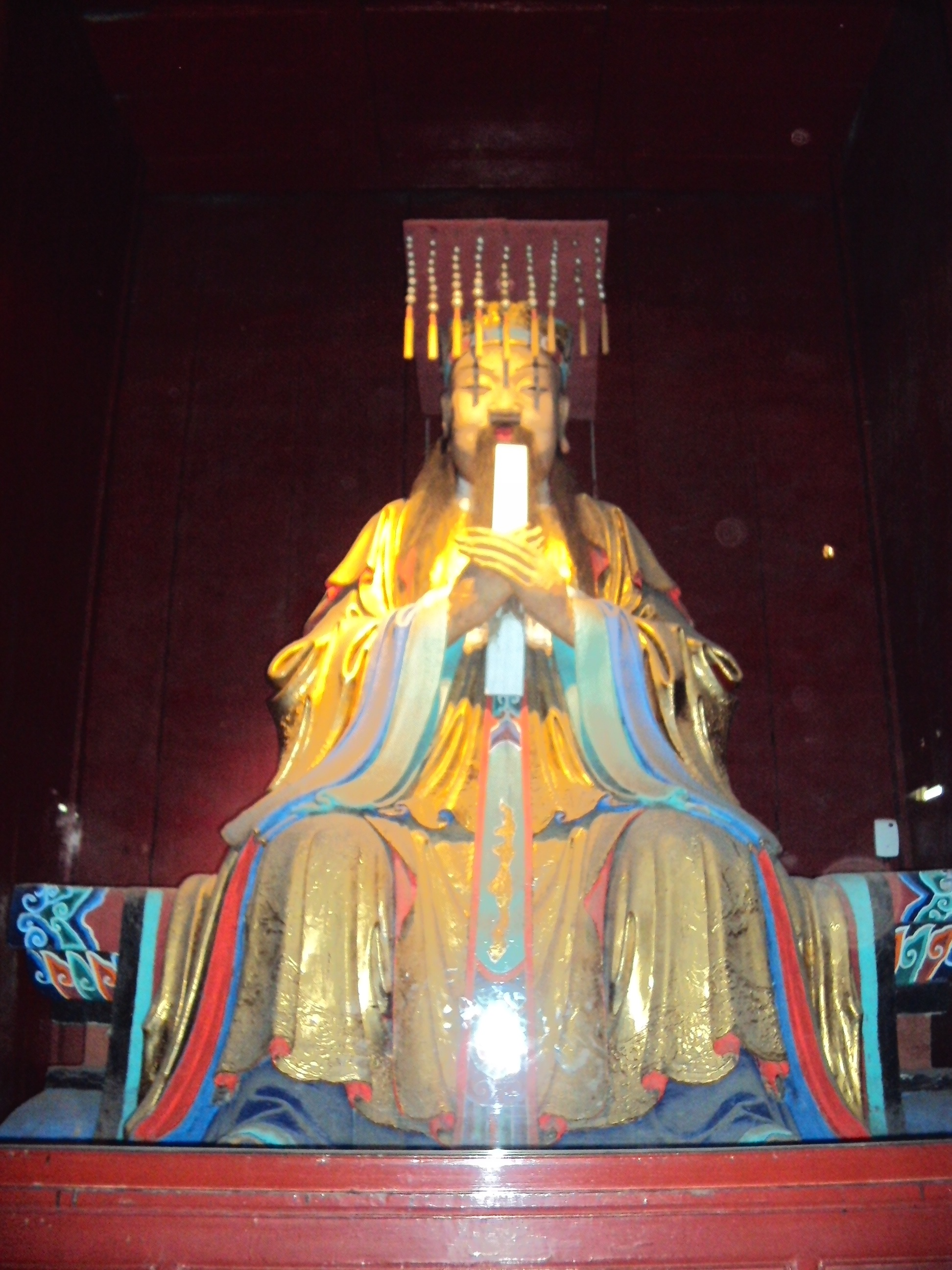 成都武侯祠内关羽的塑像